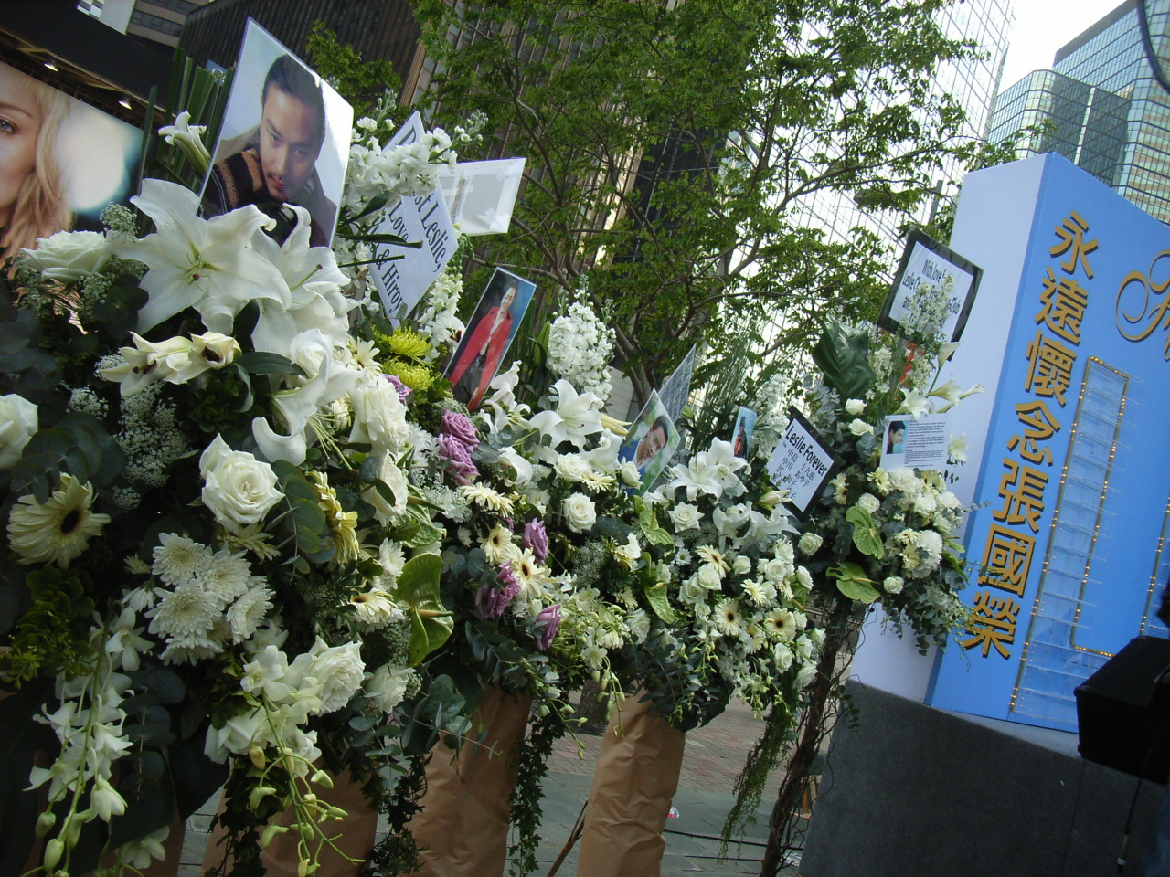 Mr Leslie Cheung, 張國榮逝世周年紀念日 2006年4月1日 香港 中環康樂廣場